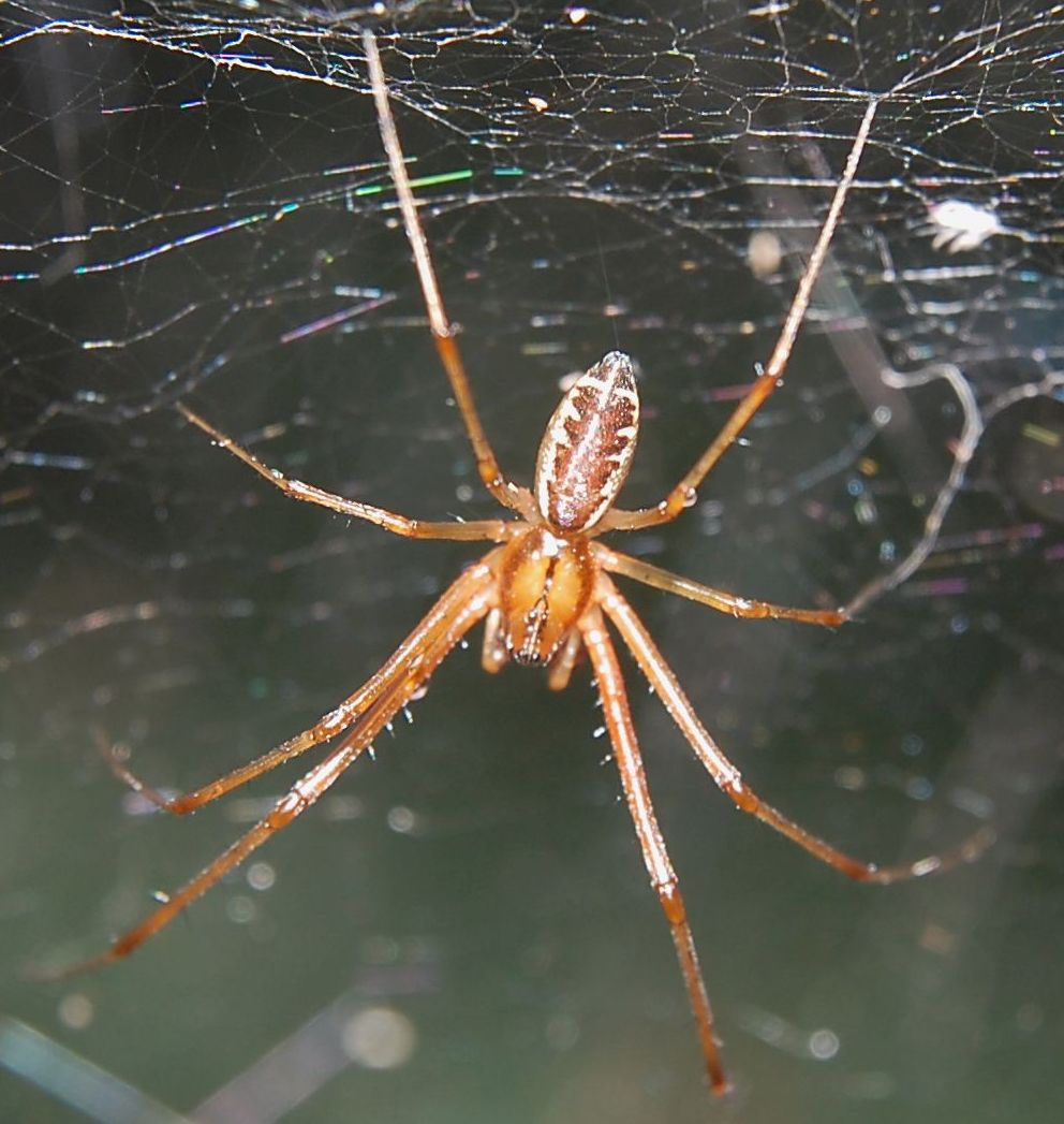 Linyphia triangularis, male